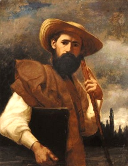 Self-portrait